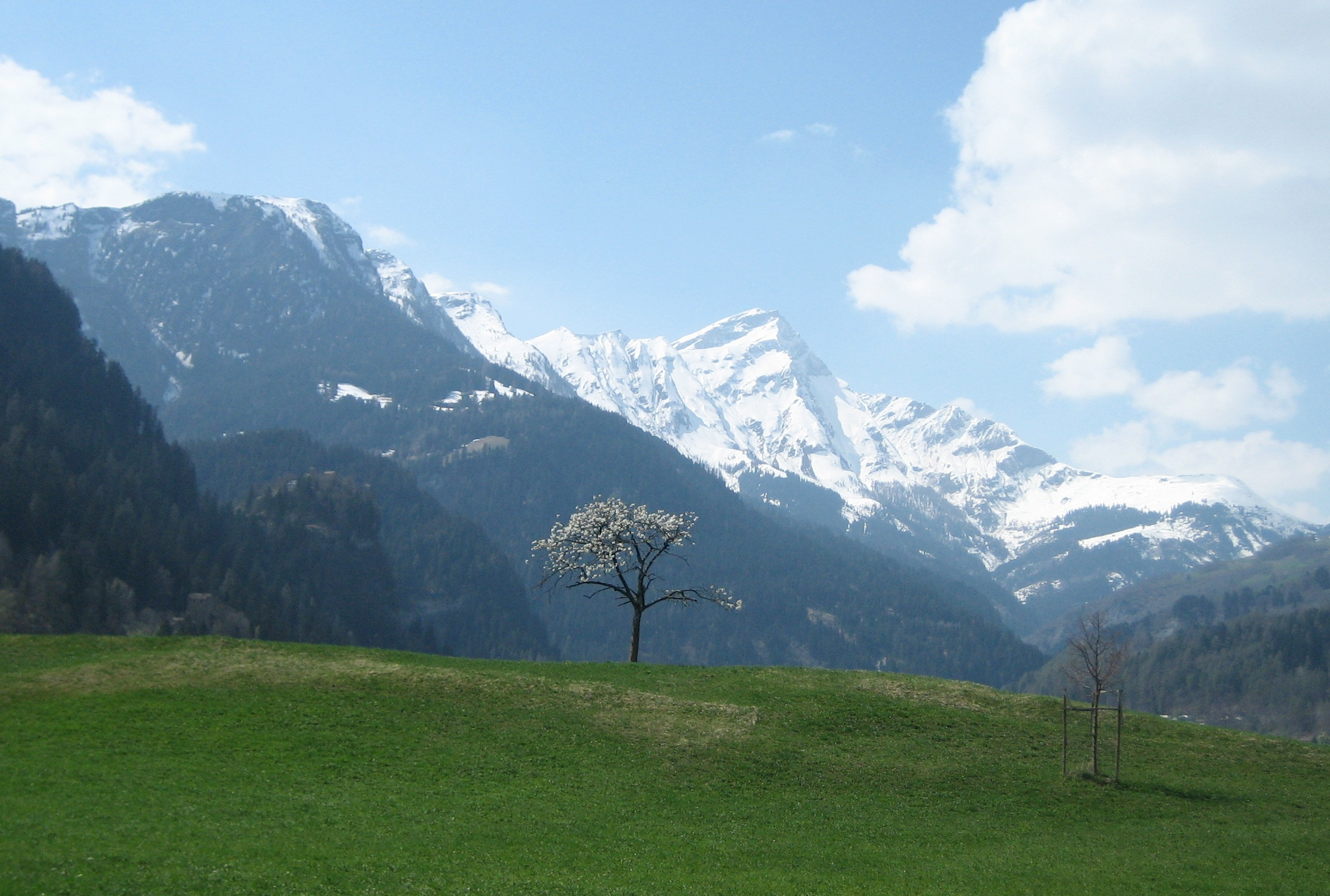 Piz Beverin